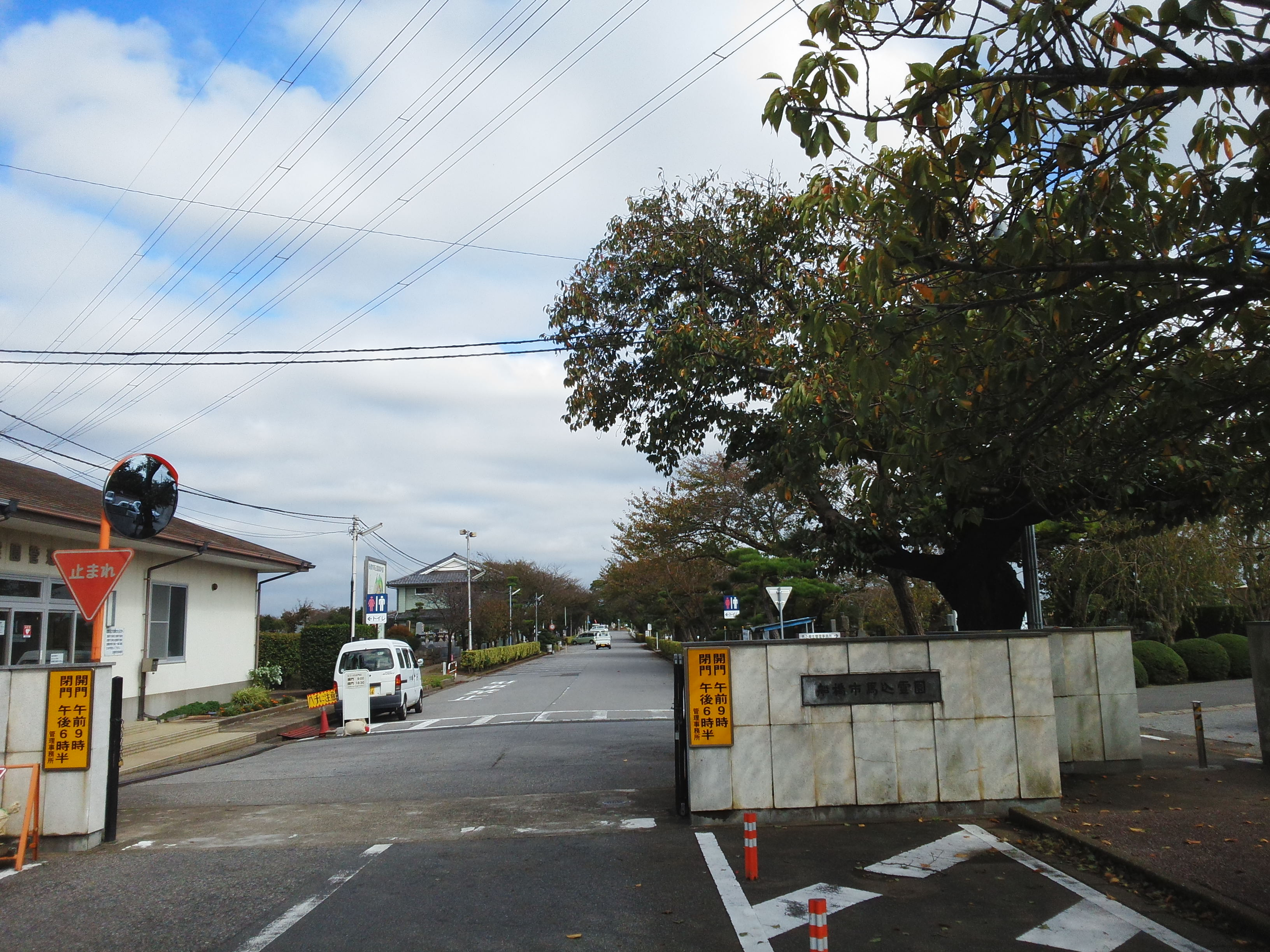 船橋市馬込霊園正門、2014年10月16日撮影